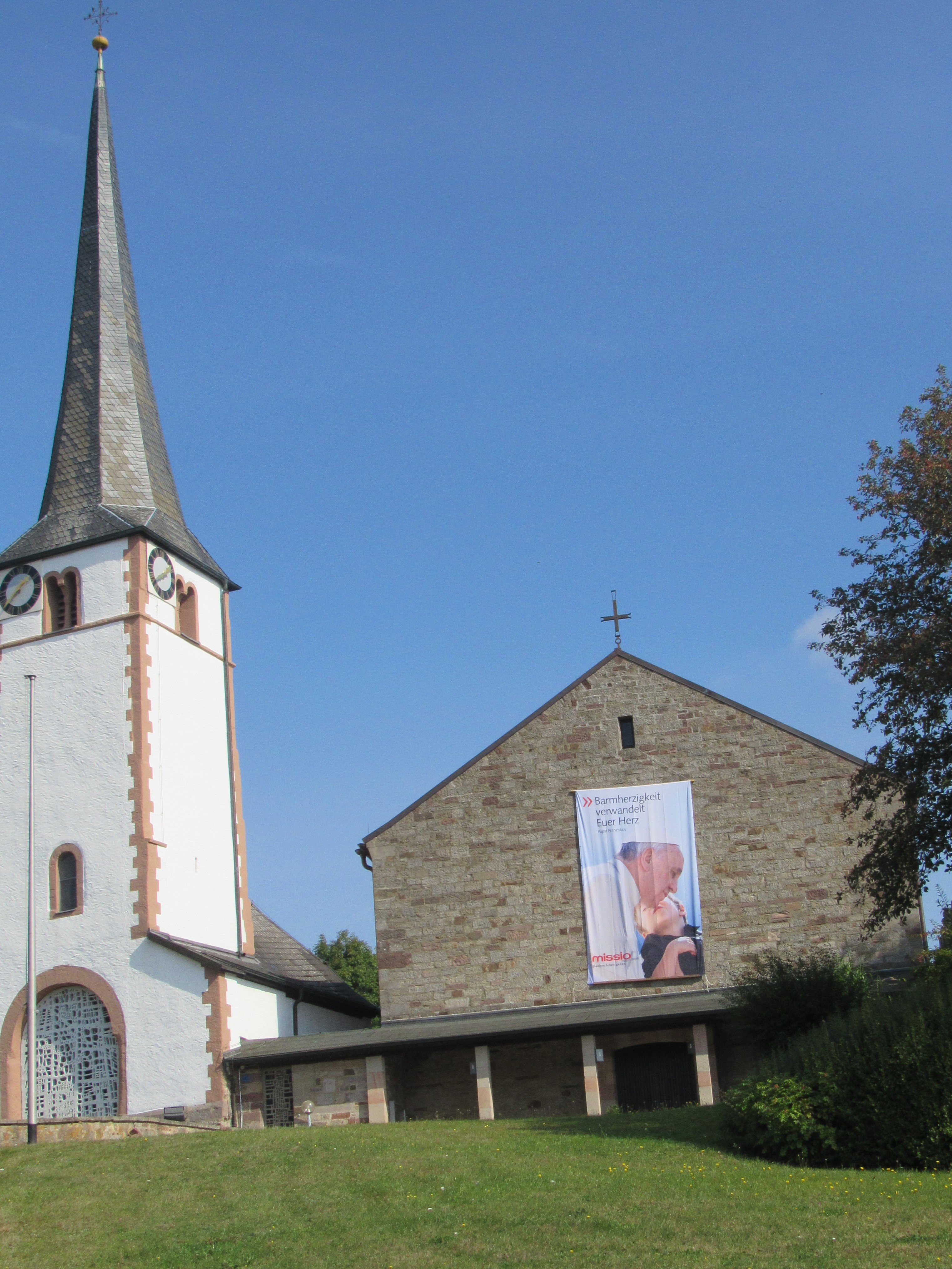 Turm und Langhaus